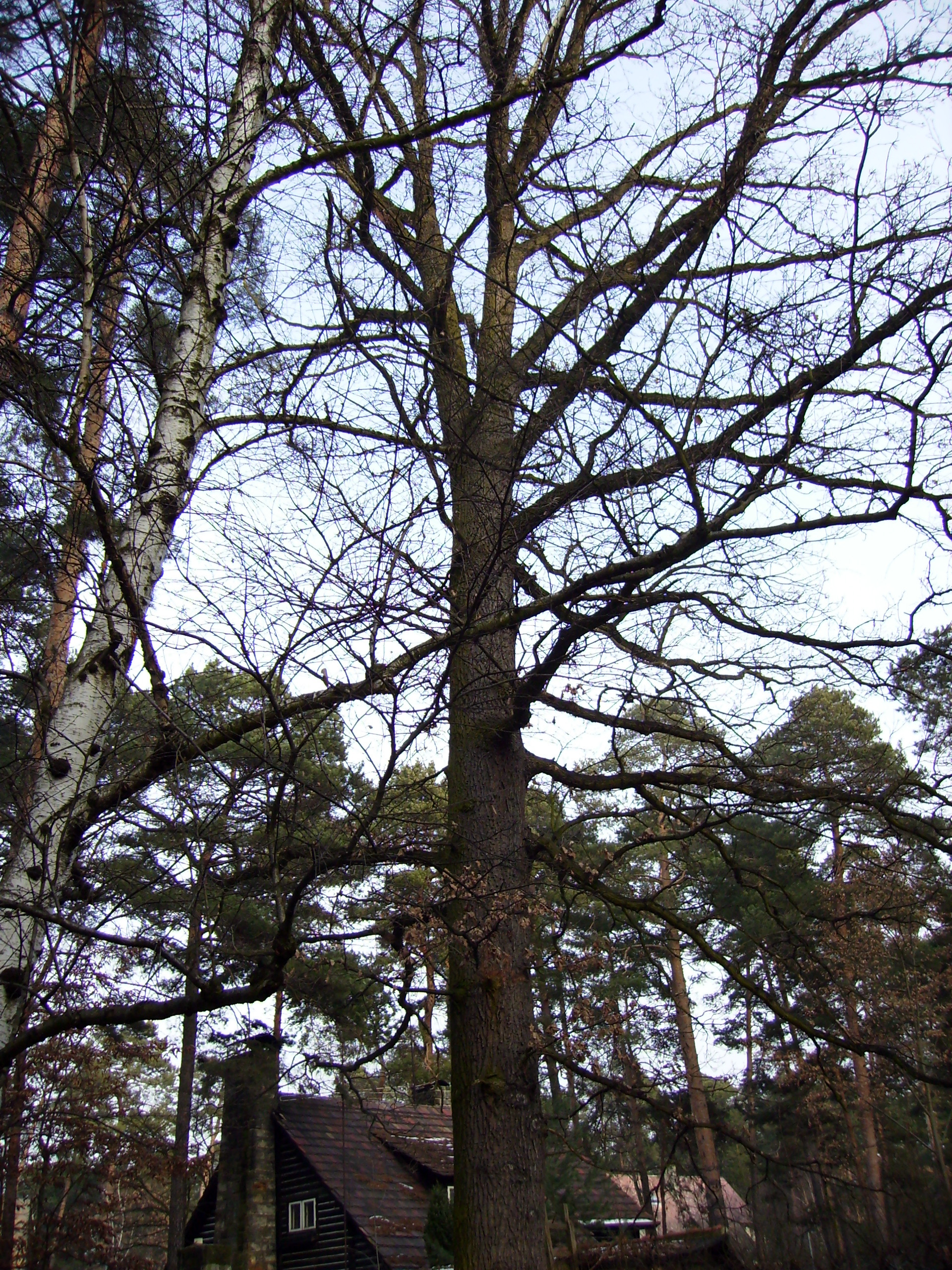 Památný strom ve Smiřické ulici v Klánovicích.